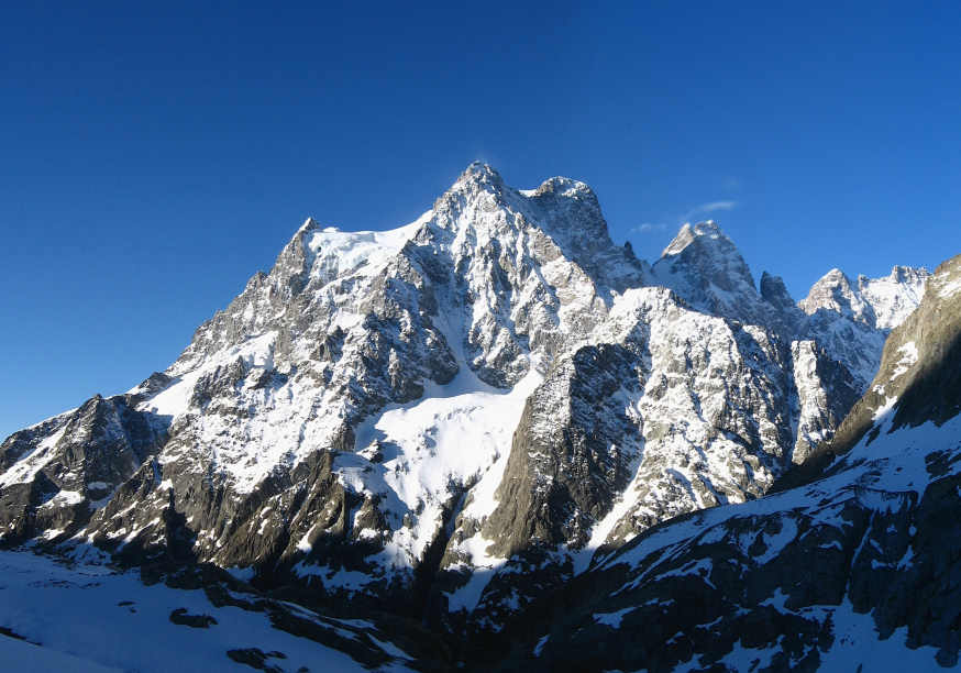 Face Nord du Mont Pelvoux